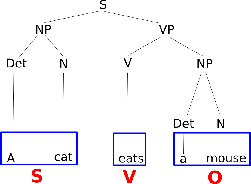 Zdanie SVO